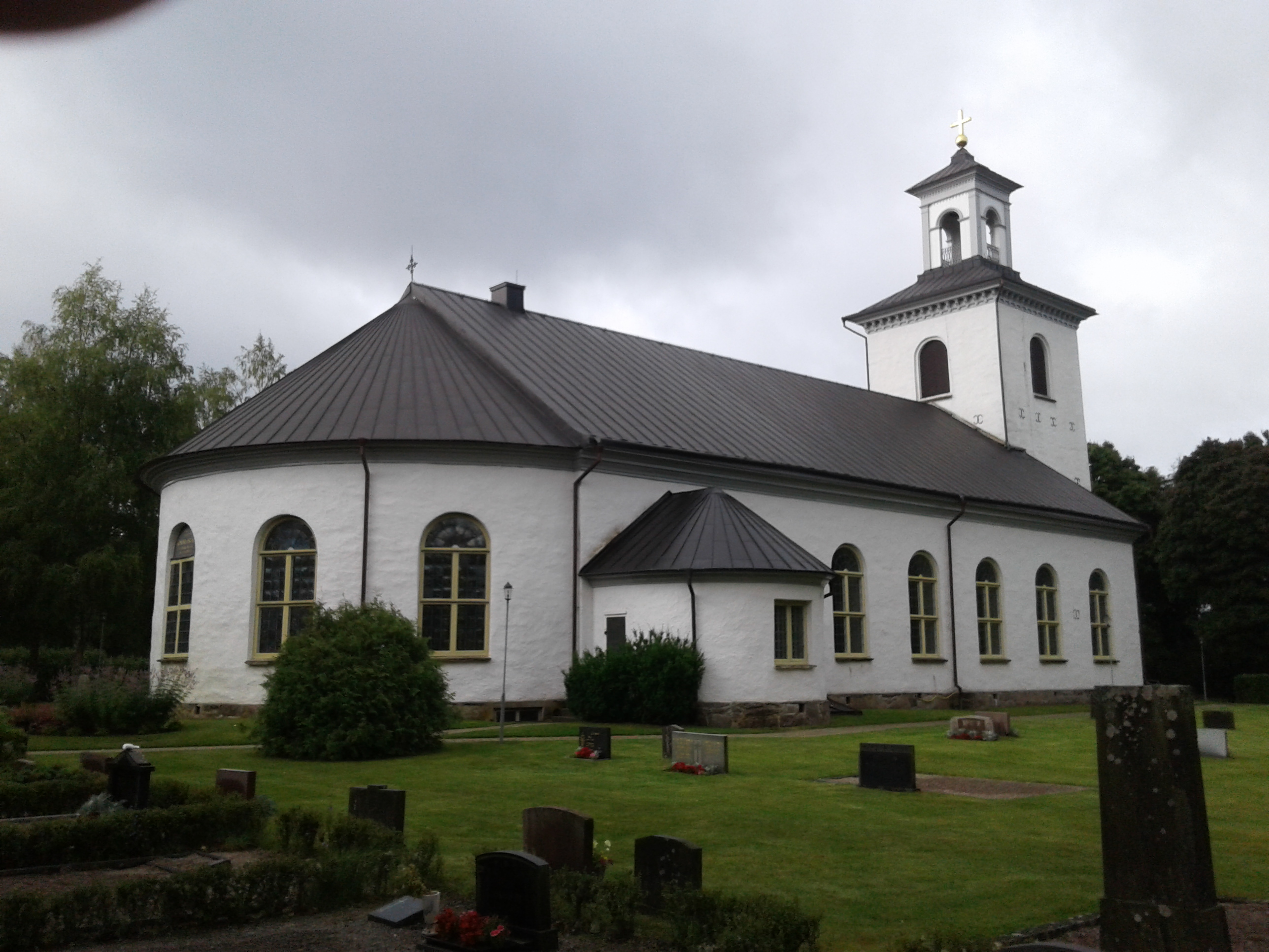 Taget en mulen förmiddag, augusti 2016.